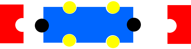 בעקבות קשירת cyclic AMP היחידות הקטלטיות משתחררות